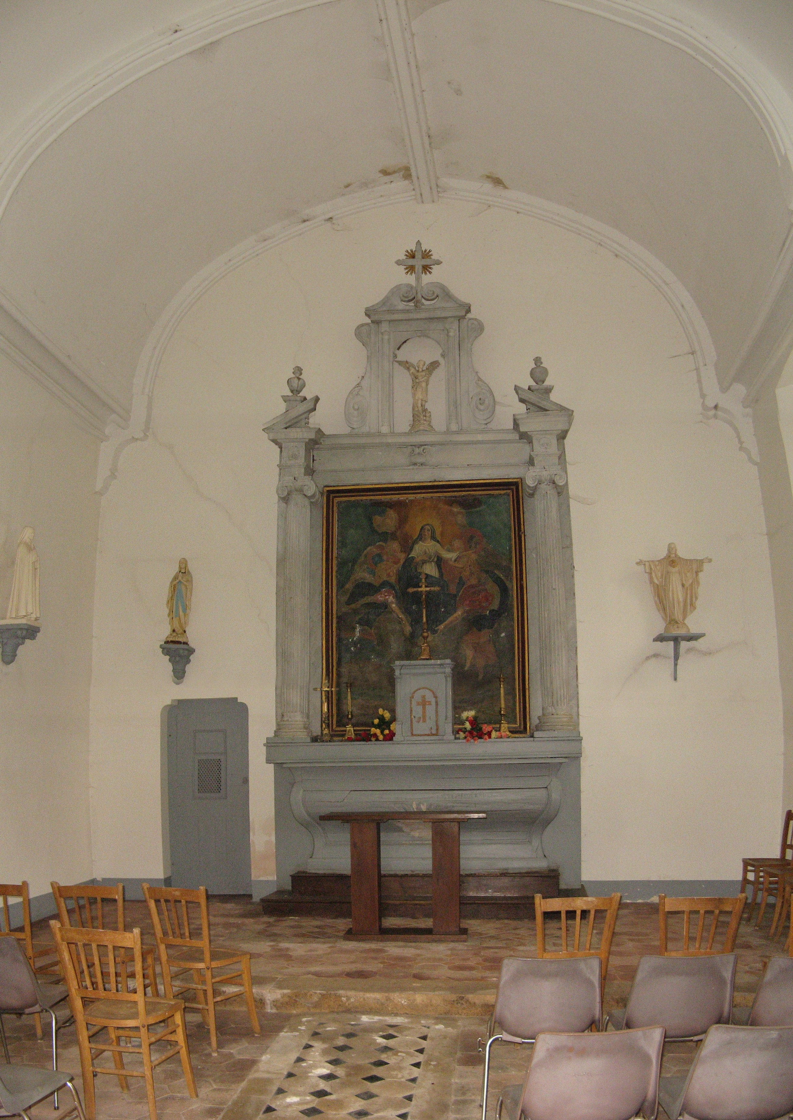 Intérieur de l'église de Saint-Ange-le-Viel, France.